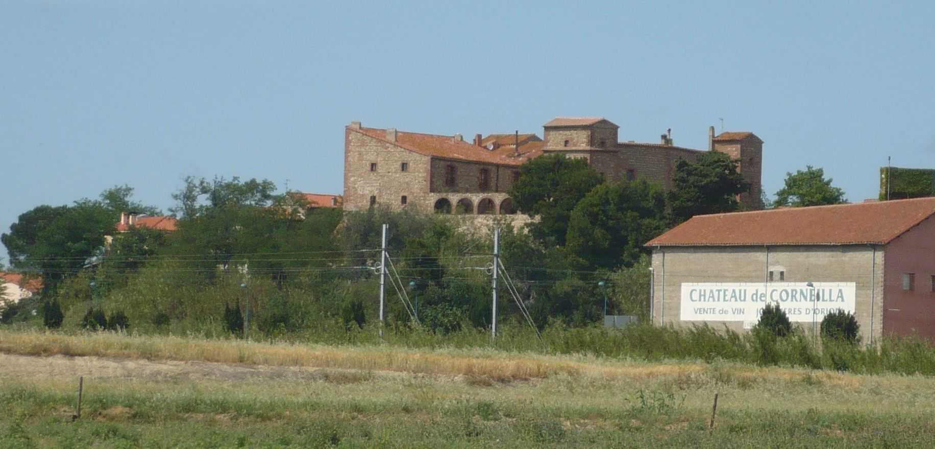 Vue générale de Corneilla-del-Vercol avec le château au centre